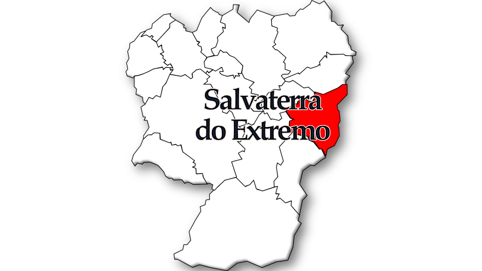 População